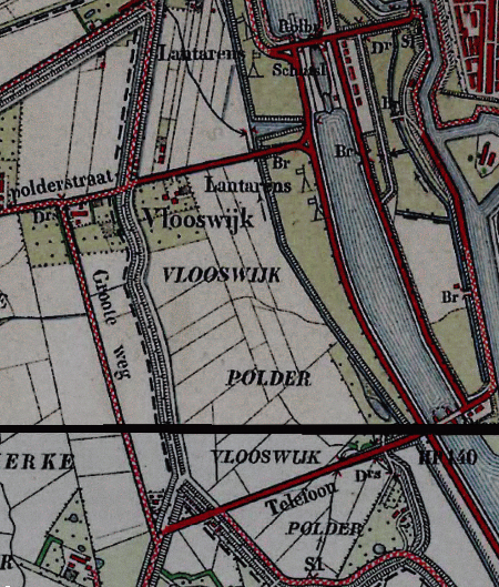 Vlooswijkpolder